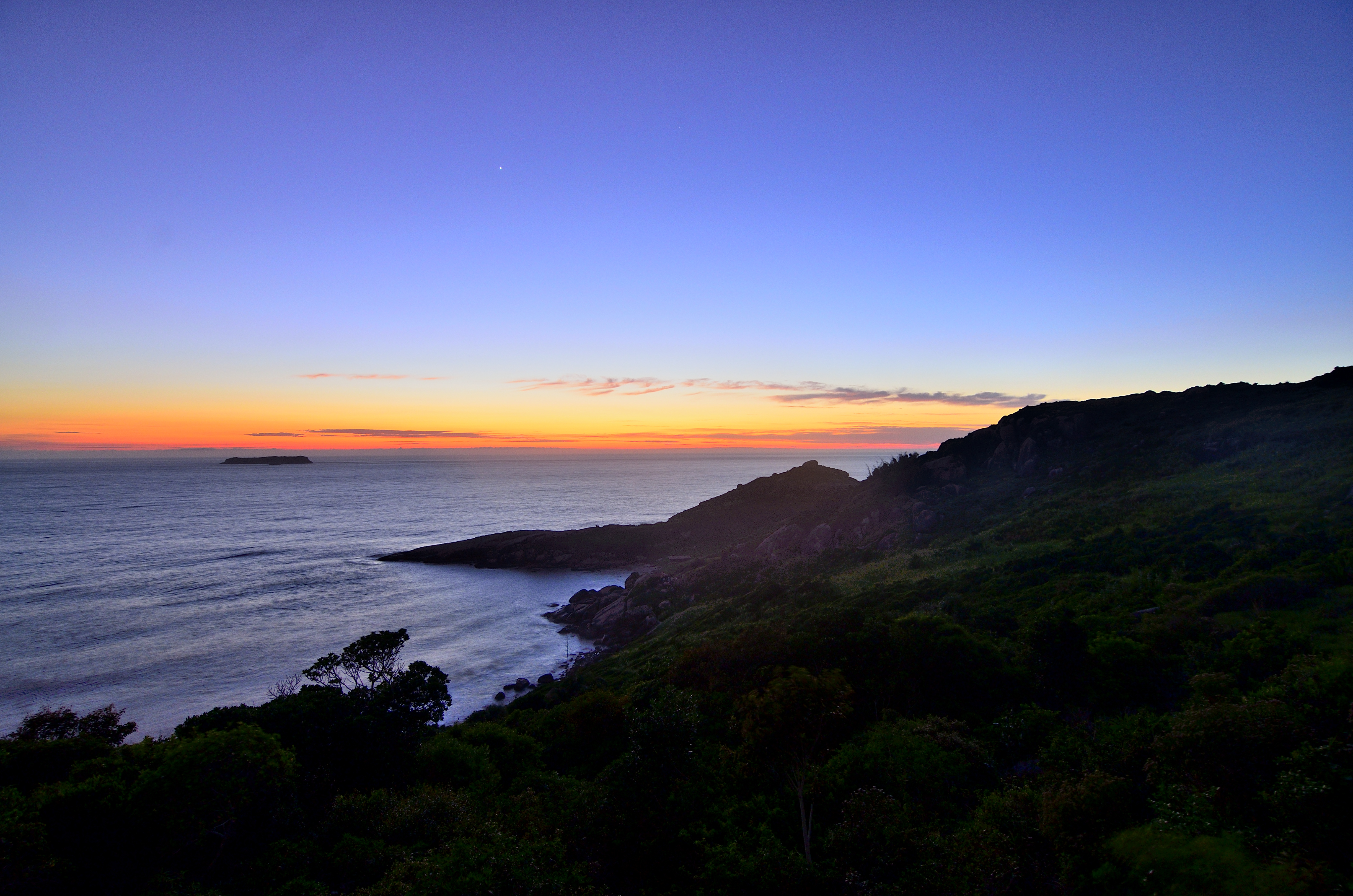 Gravata